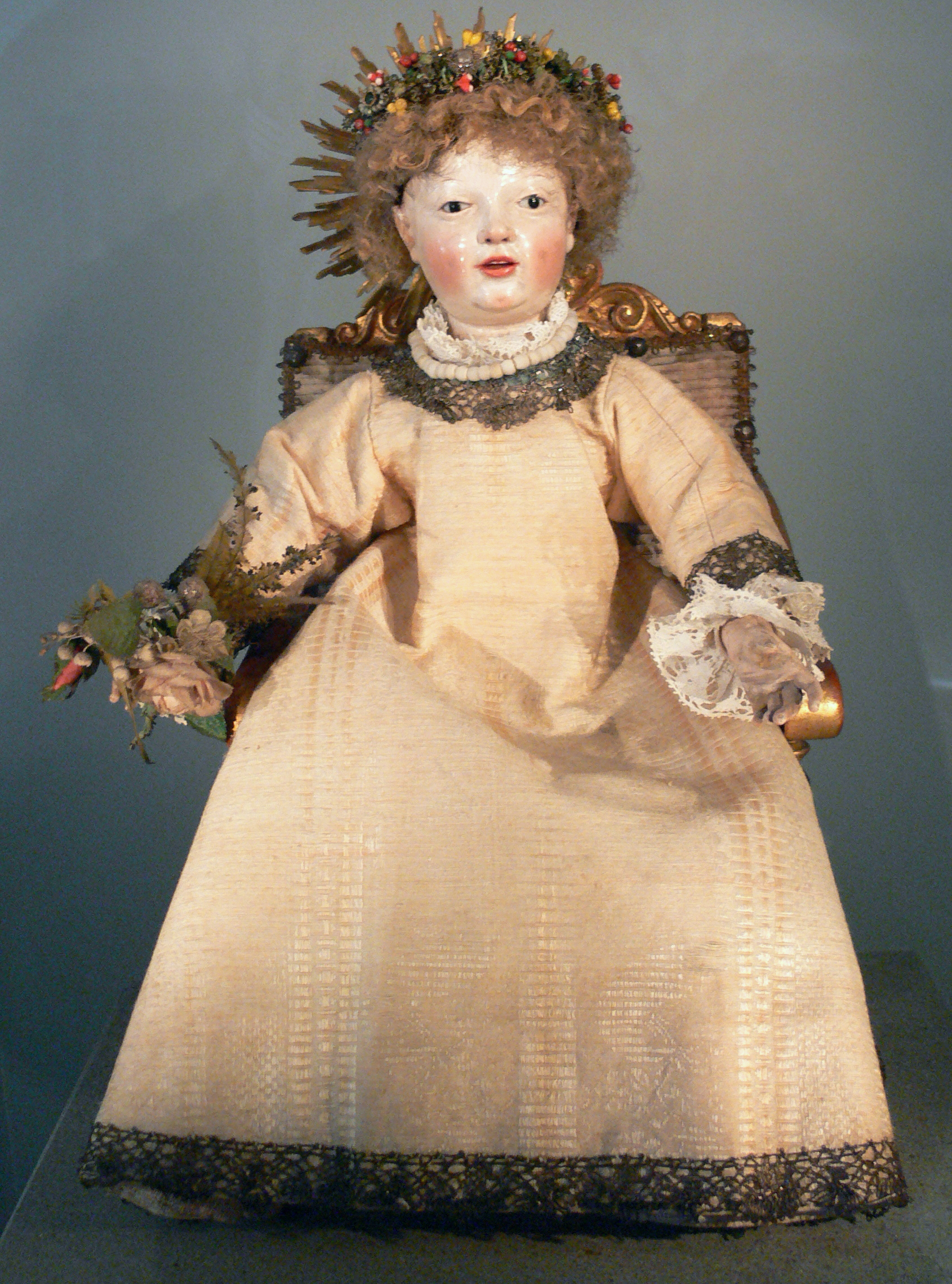 Thronendes Jesuskind, Süddeutschland 18. Jh. (Thron: Ende 17. Jh.); Krippensammlung des Bayerischen Nationalmuseums, München